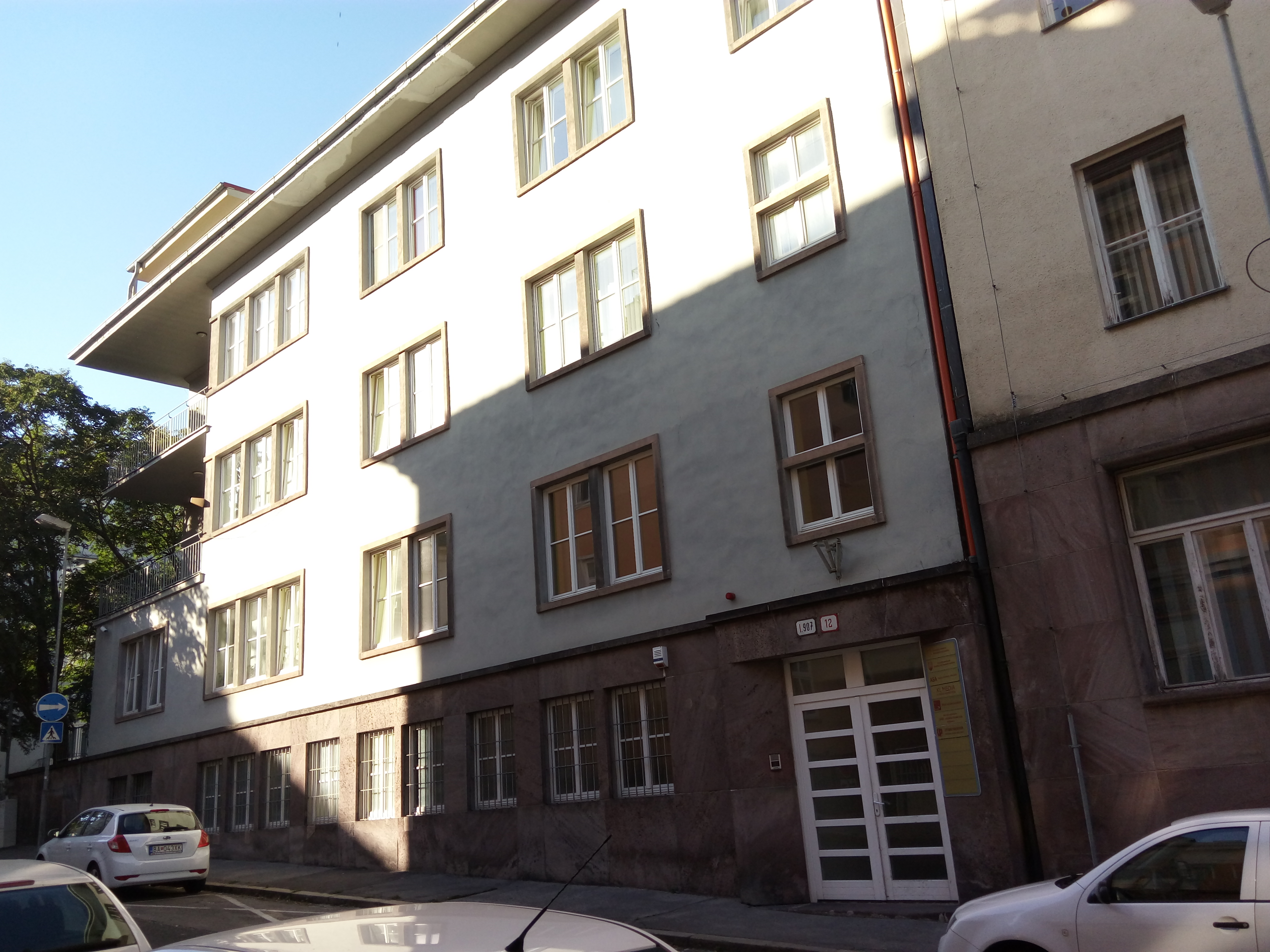 Gunduličova 12, Staré Mesto, Bratislava